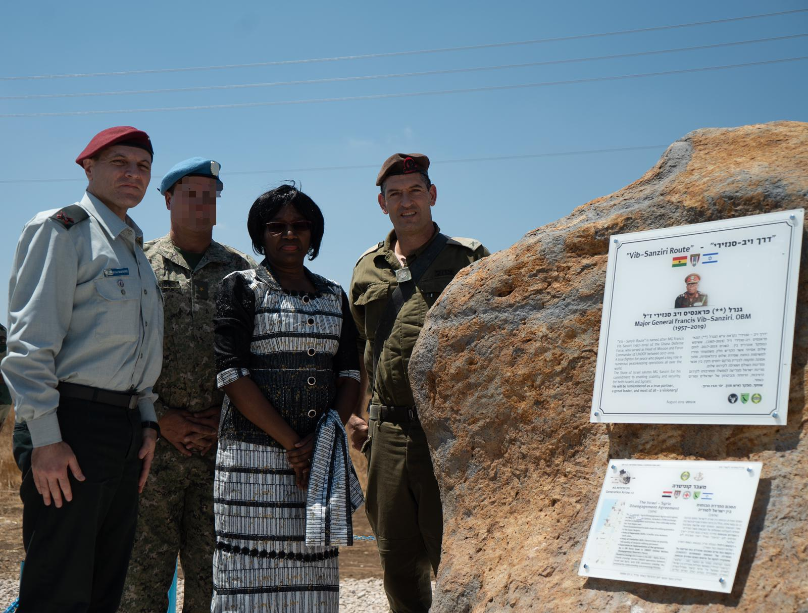 נ.צ. 778263 / 275459 -9999 מ' בעקבות הסכם הפרדת הכוחות בין ישראל לסוריה נפתח מעבר בין ישראל לסוריה – מעבר קוניטרה. בשנת 2015 נסגר בעקבות מלחמת האזרחים בסוריה, וב-2018, ביוזמת חטיבת קשרי החוץ (קש"ח), נפתח מחדש. אבן הפינה הוקמה במסגרת פרויקט "חץ הדורות", להנצחת מורשת שיתופי הפעולה של צה״ל עם צבאות זרים.